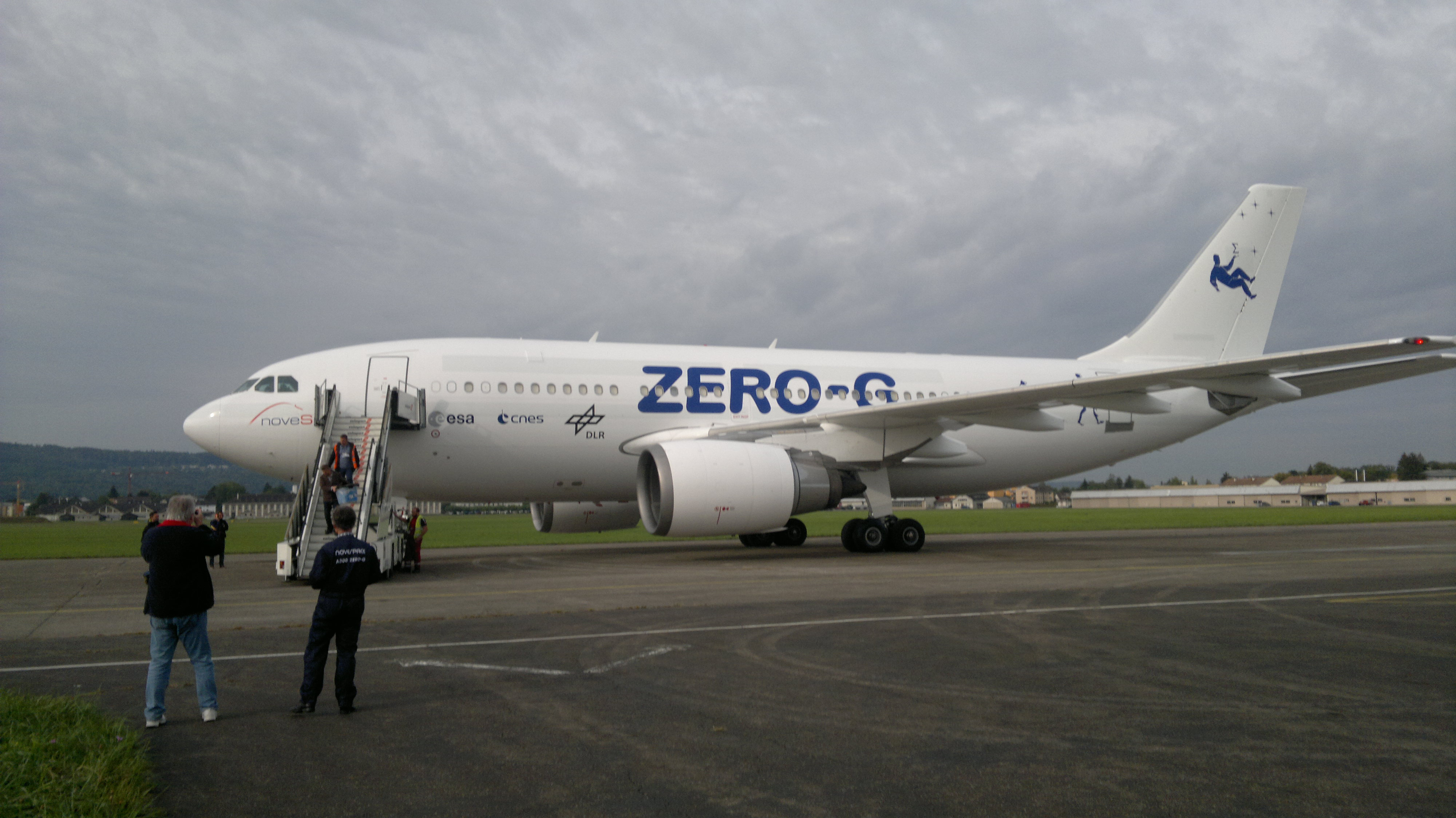 Zero-g in LSMD